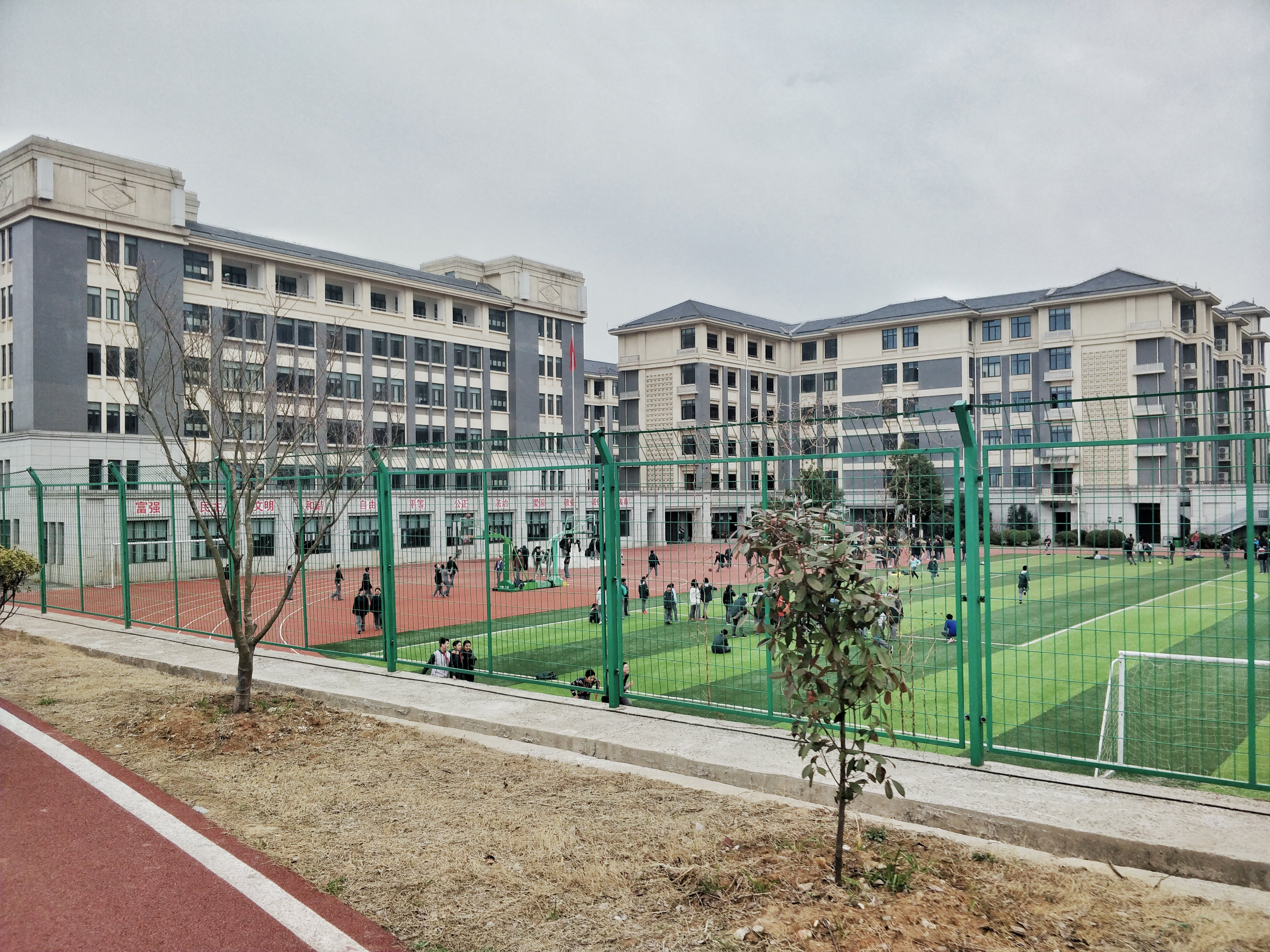 南京师大附中树人学校操场及建筑，左侧为行政楼，右侧为教学楼。